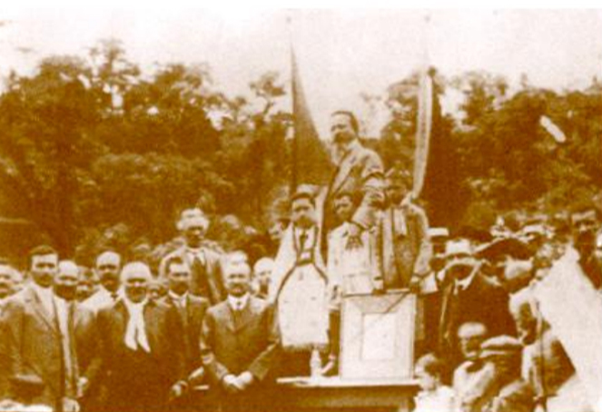 Lançamento da pedra fundamental da primeira cooperativa agrícola de Antônio Prado. A partir da esquerda estão José Dotti, Padre José Benini, Olímpio Dotti (menino abraçado a Stefano Paternó), Armando Miller (menino, filho do Intendente Inocêncio Miller) e o Intendente Tenente Coronel Inocêncio de Mattos Miller.